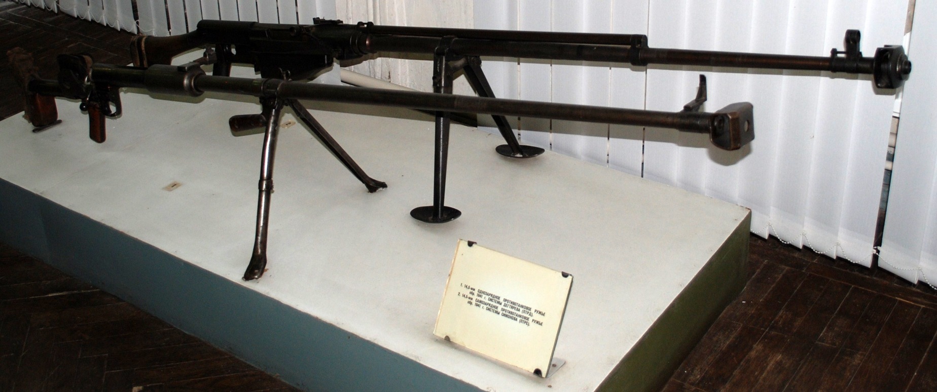 Противтенковске пушке ПТРС и ПТРД у музеју Отаџбинског рата у С. Петербургу